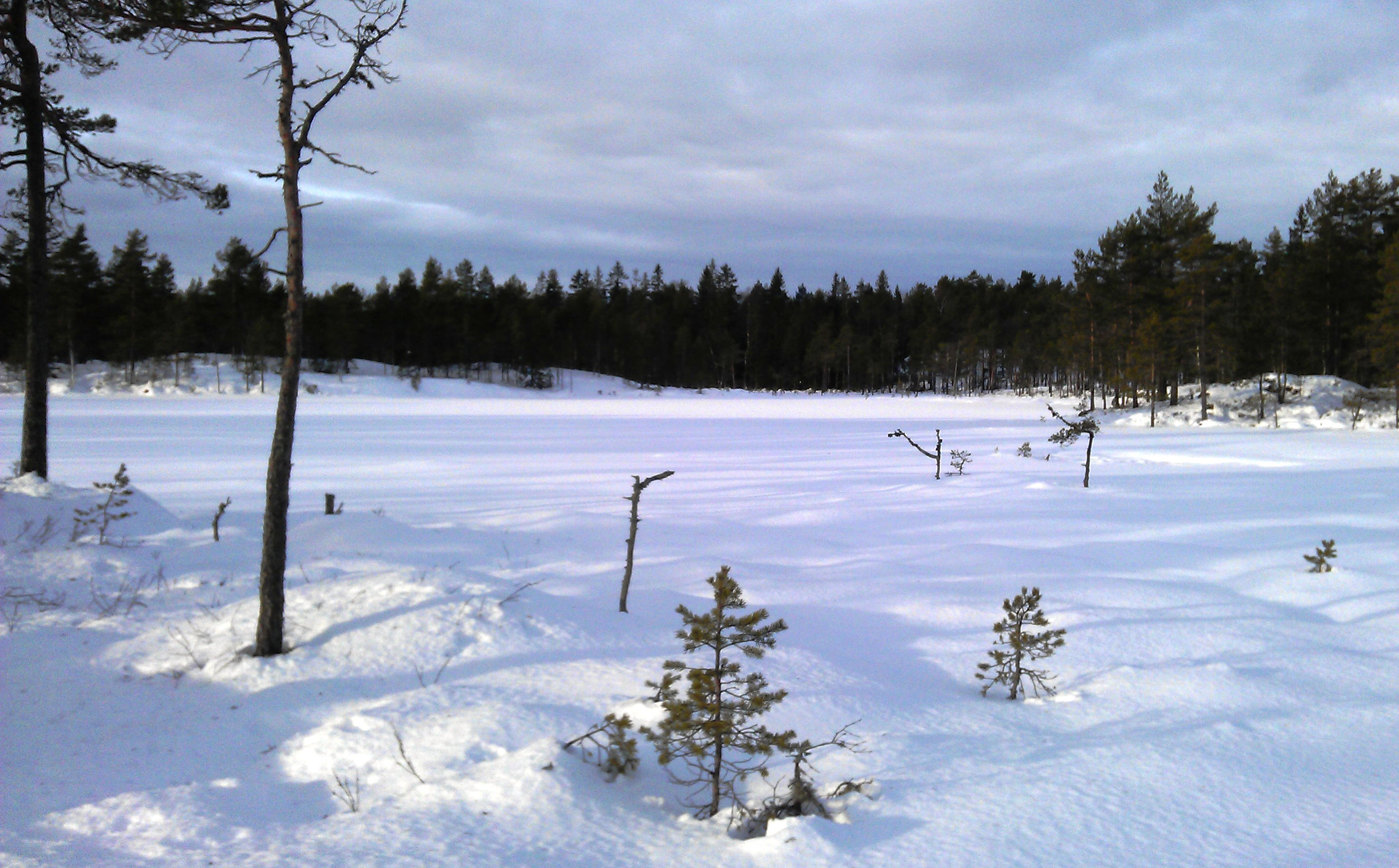 Høltjern ved Kjølen - nord for tettstedet Lierfoss i Aurskog-Høland kommune.